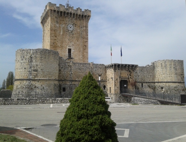 Castello Piccolomini di Ortucchio